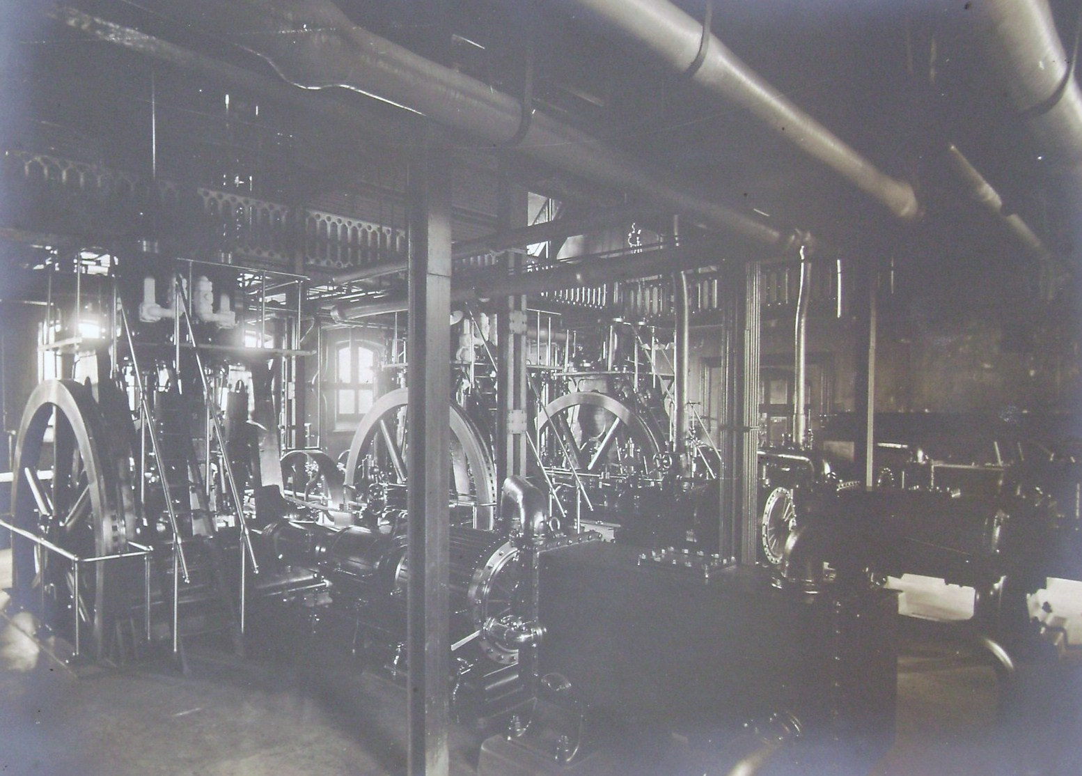 Fotografía de la antigua sala de máquinas del Frigorífico Sansinena